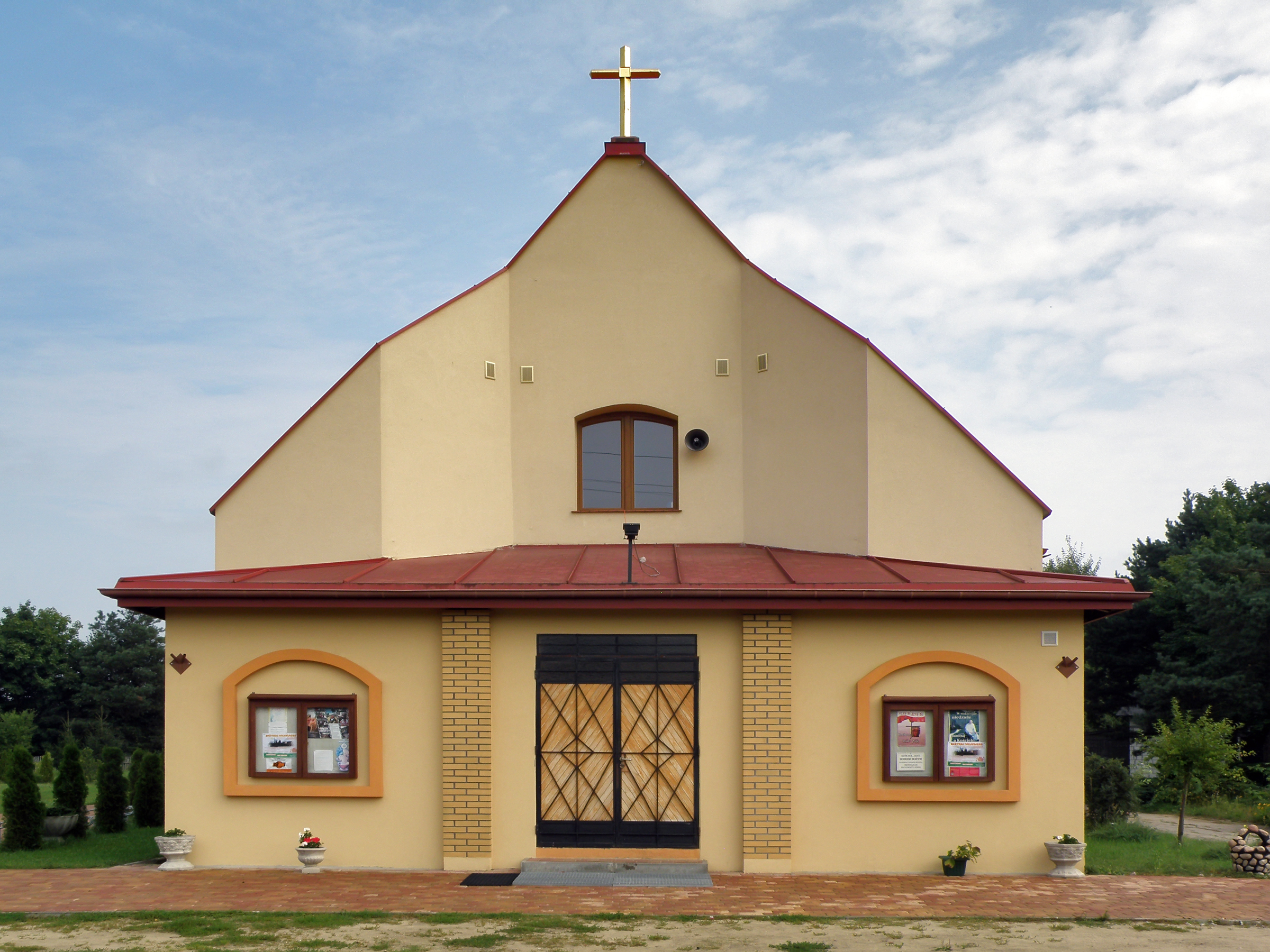 Polska, Pisz - Parafia rzymsko-katolicka Najświętszego Serca Pana Jezusa This photo of Warmian-Masurian Voivodeship was taken during Wikiexpedition 2012 set up by Wikimedia Polska Association. You can see all photographs in category Wikiekspedycja 2012. The making of this document was supported by Wikimedia Polska.